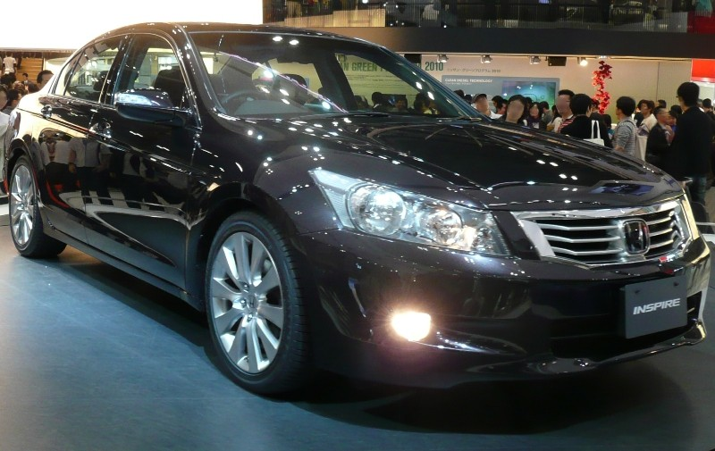 Honda Inspire.